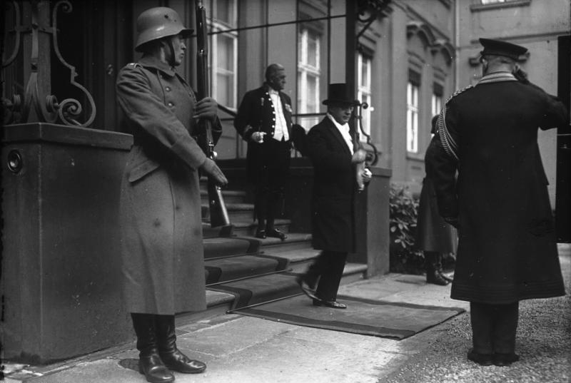 Feierlicher Empfang des neuen Gesandten von Panama in Berlin Narziso Garay zur Entgegennahme seines Beglaubigungsschreibens beim Reichspräsidenten von Hindenburg. Anwesend waren der Reichsaussenminister Dr. Curtius, Staatssekretär von Schubert und der Chef des Protokolls Graf Franz von Tattenbach. Der neue Gesandte von Panama Narziso Garay verlässt unter Ehrenbezeugungen der Reichswehr das Reichspräsidentenpalais in der Wilhelmstrasse.